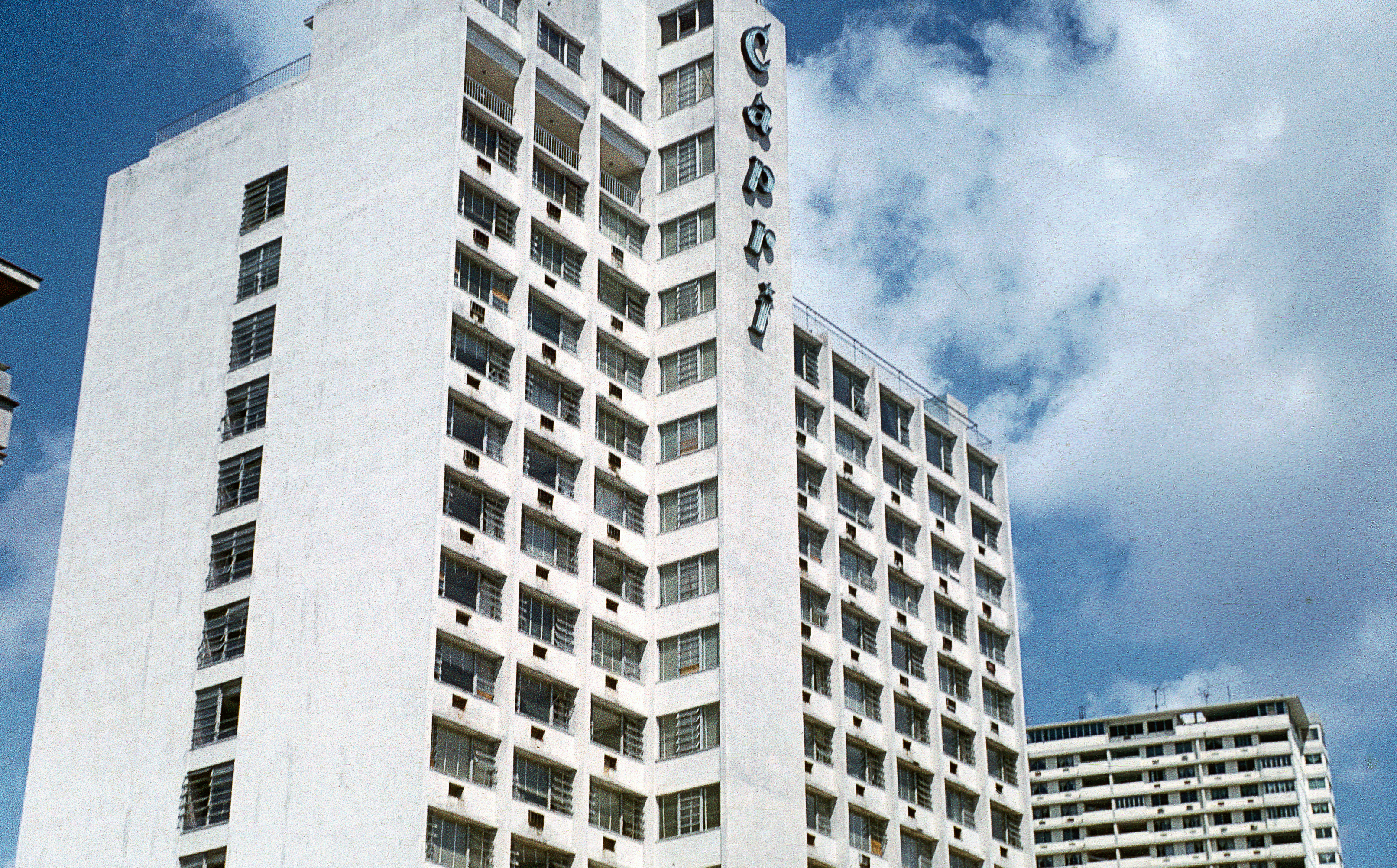 Miramar, Havana 1973; Hotel Capri